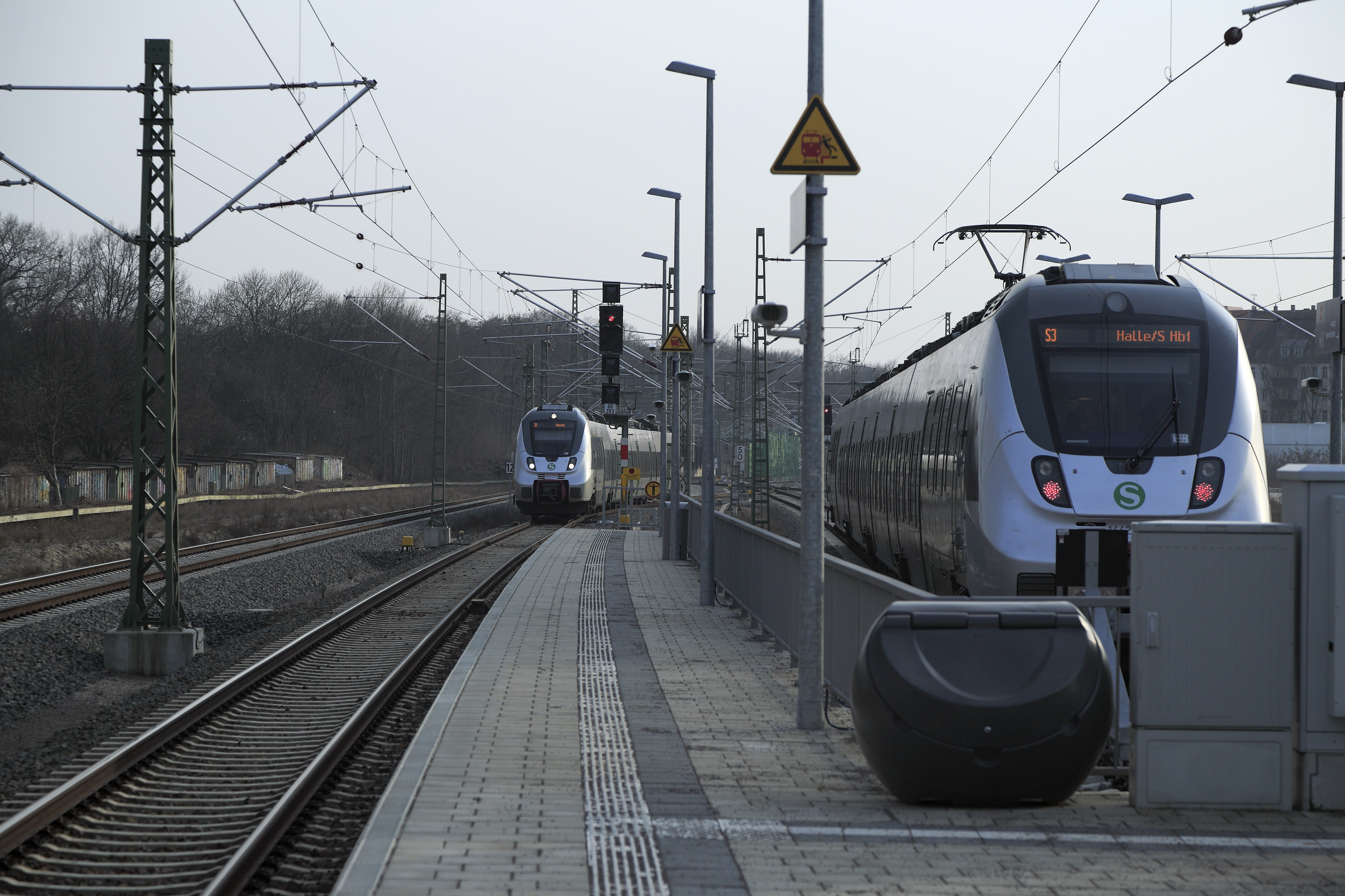 Am Stumpfgleisbahnsteig steht ein vierteiliger Triebzug der Linie S3 von und nach Halle (S) Hbf, der einfahrende Zug der Linie S1 fährt weiter nach Wurzen.